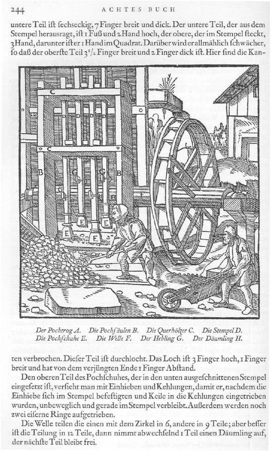 Buchseite 244 von De Re Metallica Libri XII = Zwölf Bücher vom Berg- und Hüttenwesen von Georg Agricola